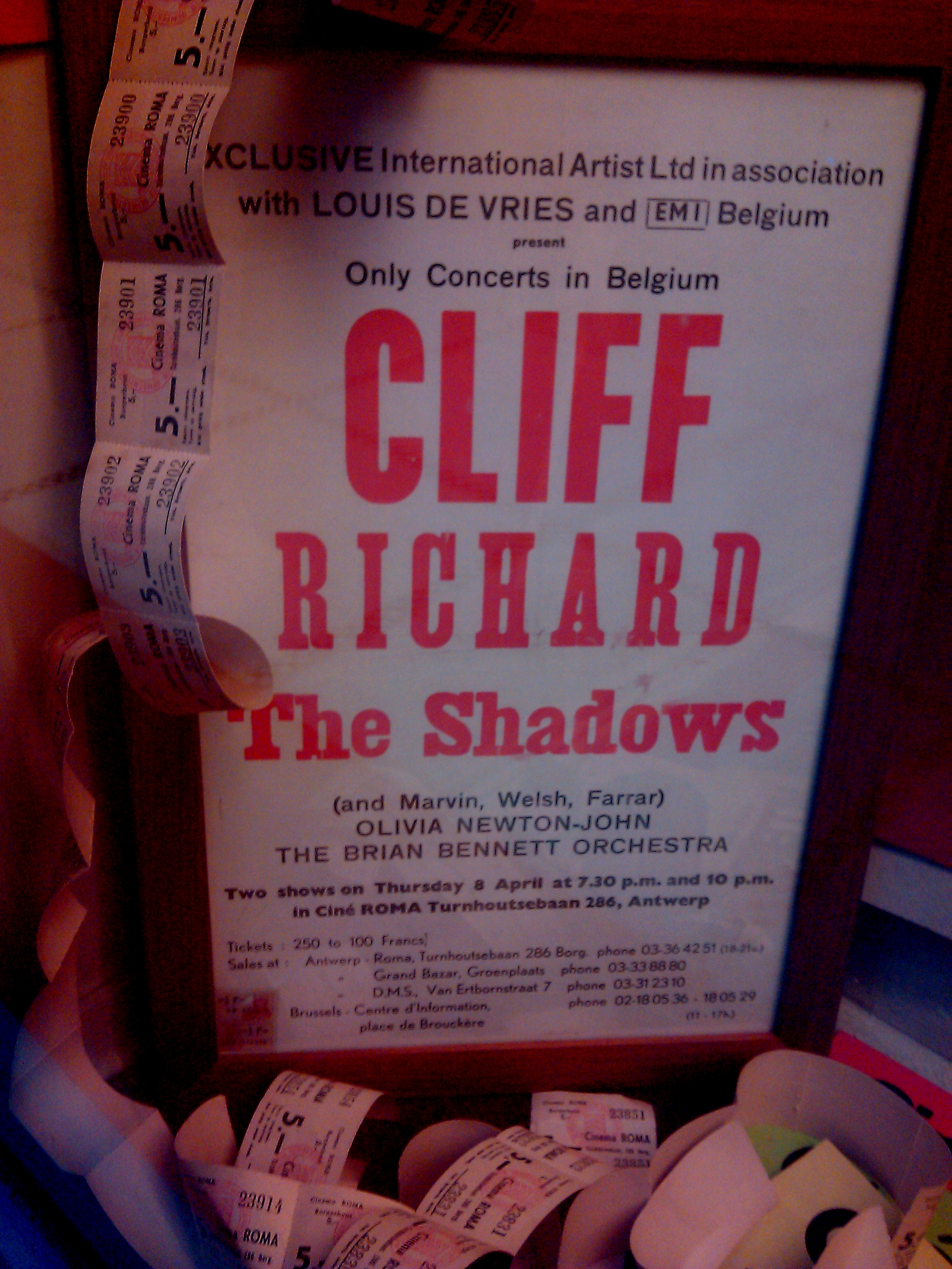 Concertaffiche in De Roma te Borgerhout, Antwerpen - voor het concert van Cliff Richard, The Shadows (Marvin, Welch & Farrar) en Olivia Newton-John, begeleid door het Brian Bennett Orchestra in De Roma, op 8 april 1971.